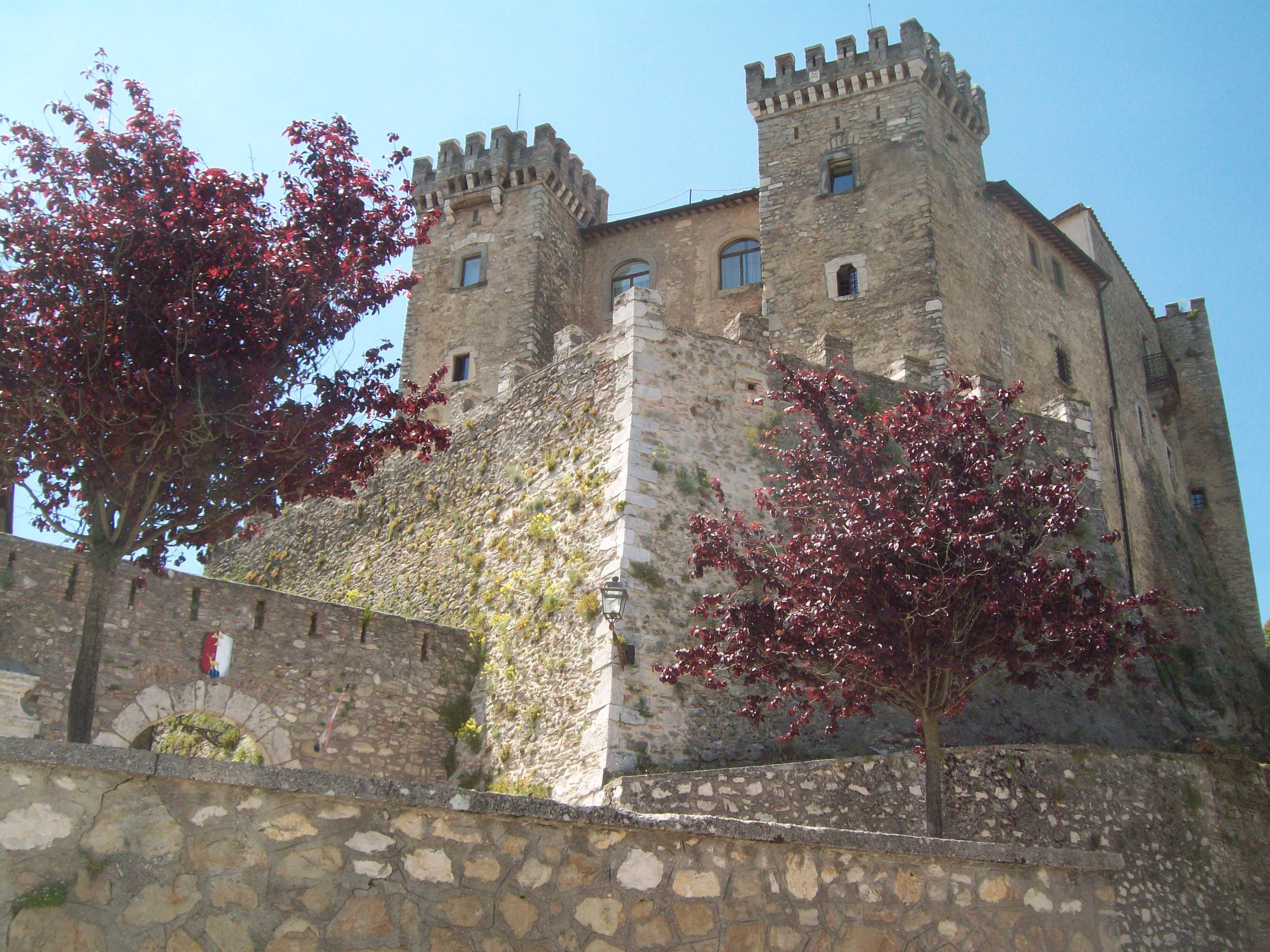 Collalto Sabino